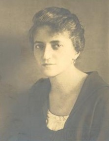 Valerie Pollaková roz. Kafková, sestra Franze Kafky